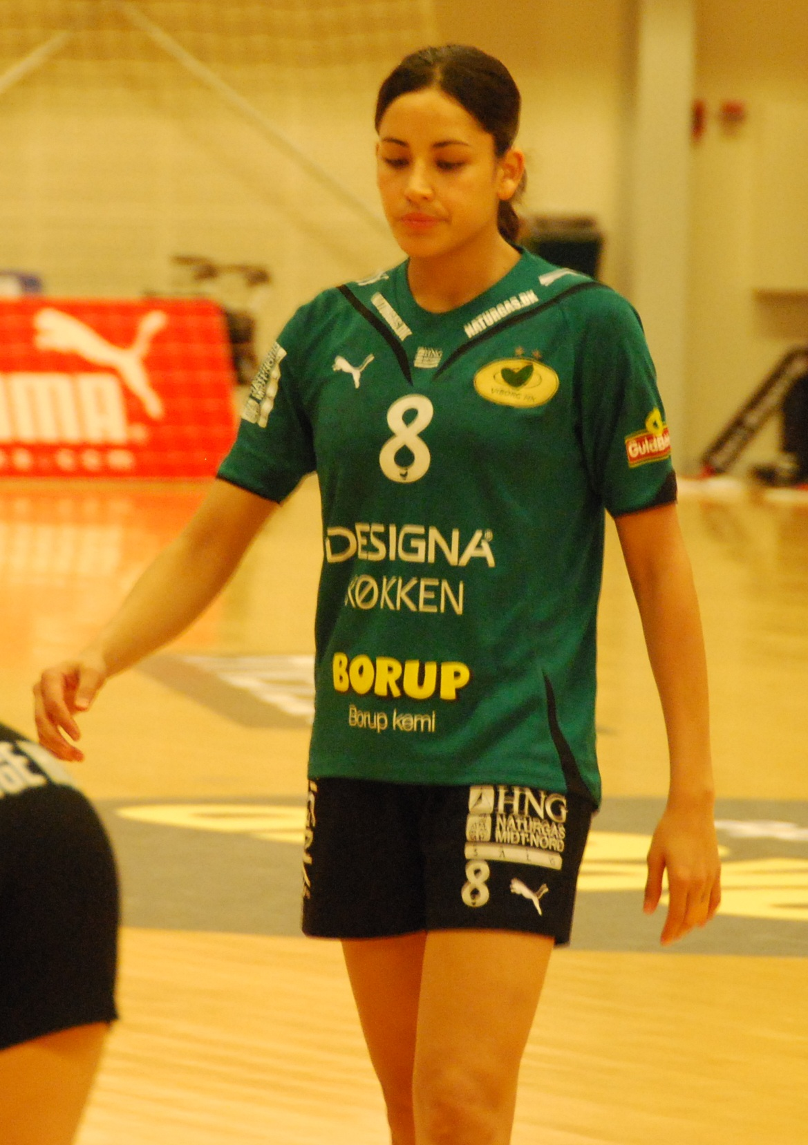 Mouna Chebbah i kamp for Viborg HK, mod Ferencvaros i Viborg Stadionhal. Cup Winners Cup, 5. februar 2011 // Viborg HK vs. Ferencvaros 34-33